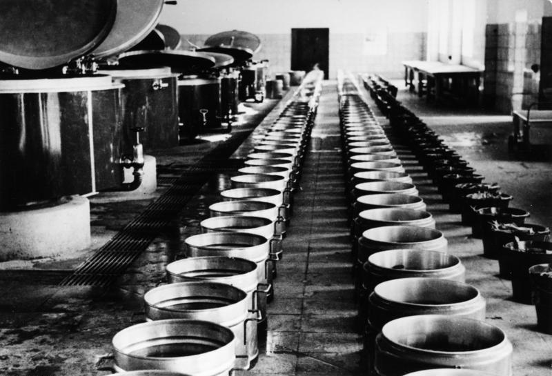 Dachau, Konzentrationslager Schutzhaftlager Dachau.- Küche